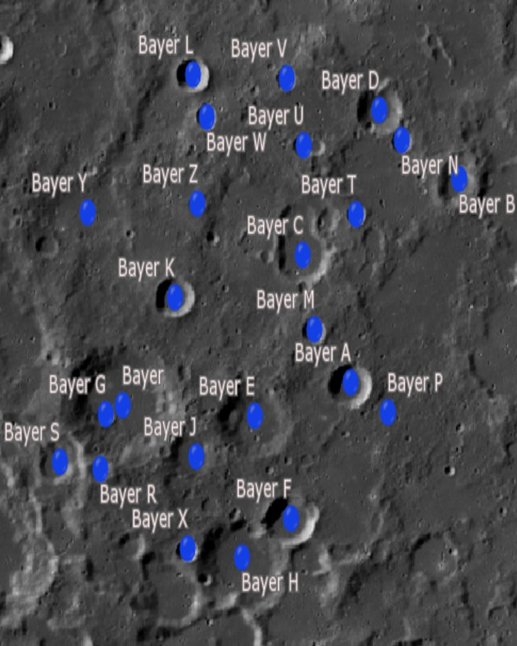 Cráter lunar Bayer. Cráteres satélite. (Imagen LRO)